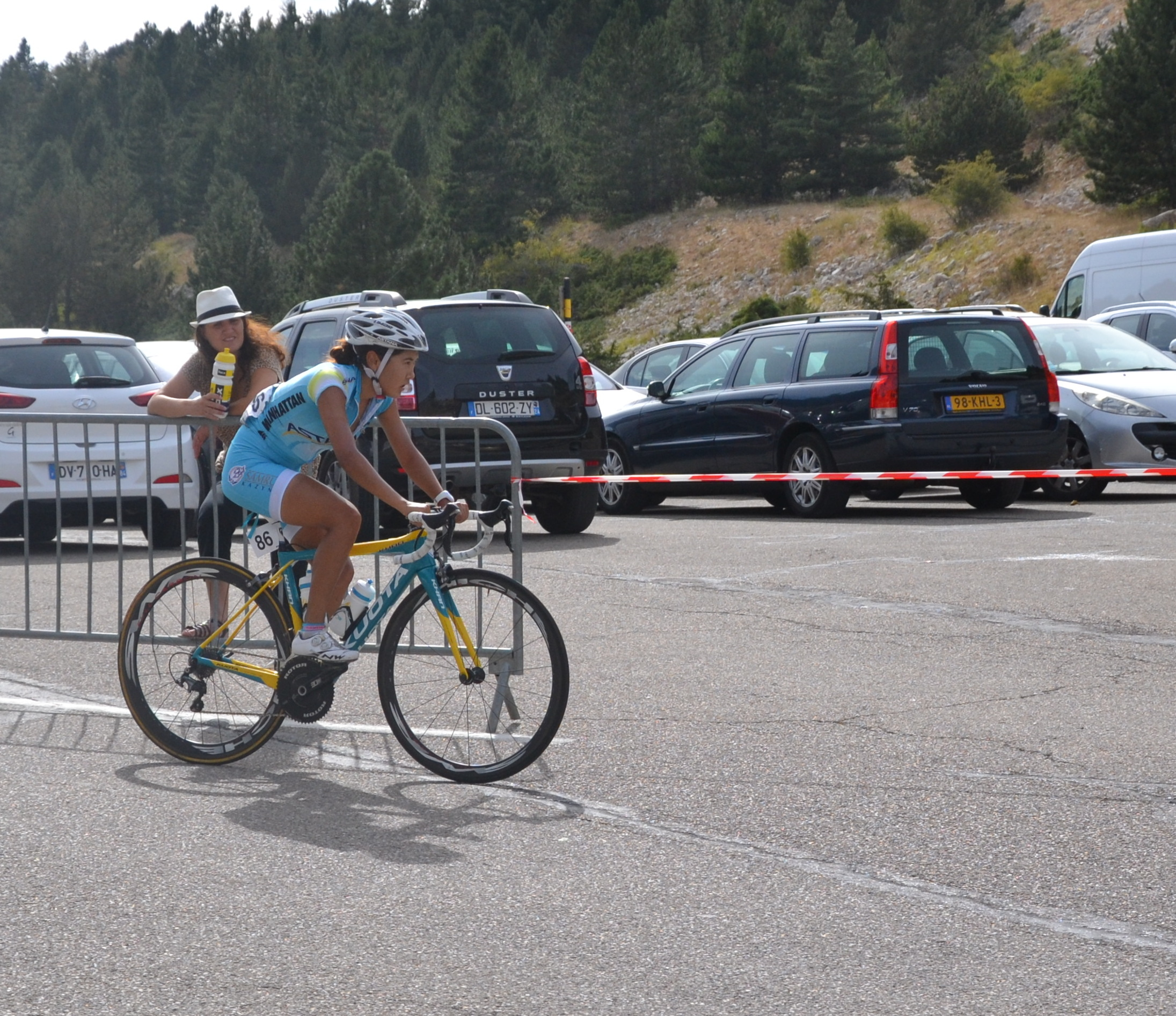 Au chalet Reynard, lors de la 3ème étape du Tour féminin international de l'Ardèche 2016